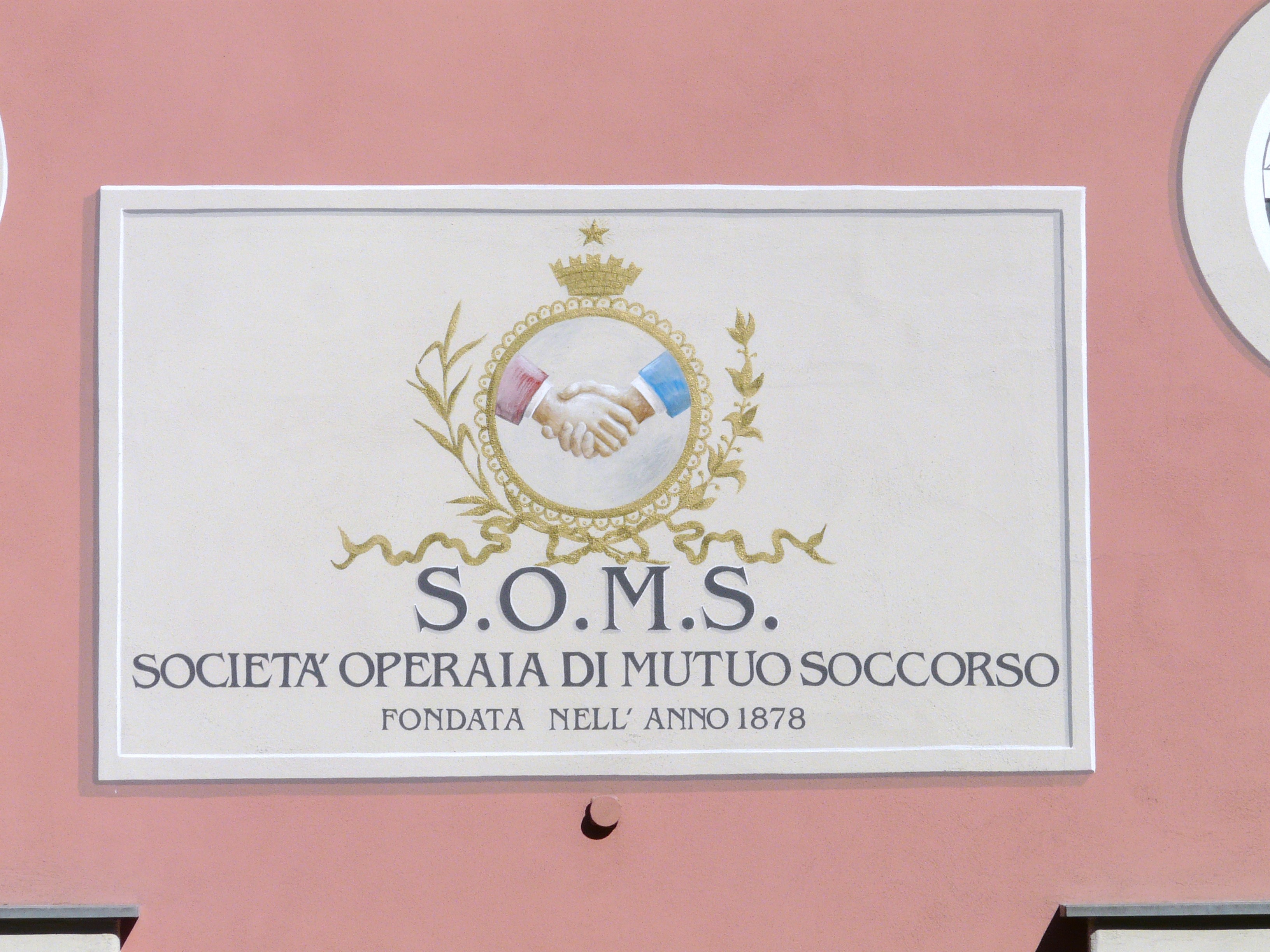 Palazzo della Società operaia di mutuo soccorso, Arquata Scrivia, Piemonte, Italy